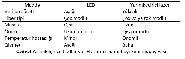 Yarımkeçirici diodlar və LED-lərin işıq məbəyi kimi müqayiyəsi